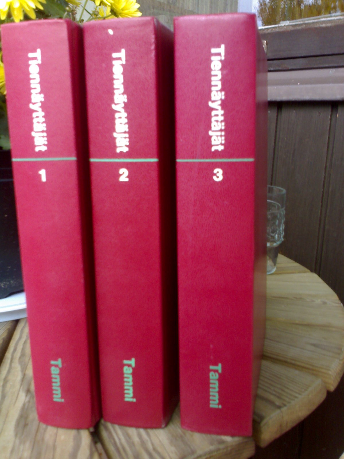 Tiennäyttäjät I-III, toim. Hannu Soikkanen.